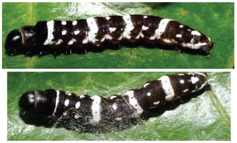 Ethmia baliostola